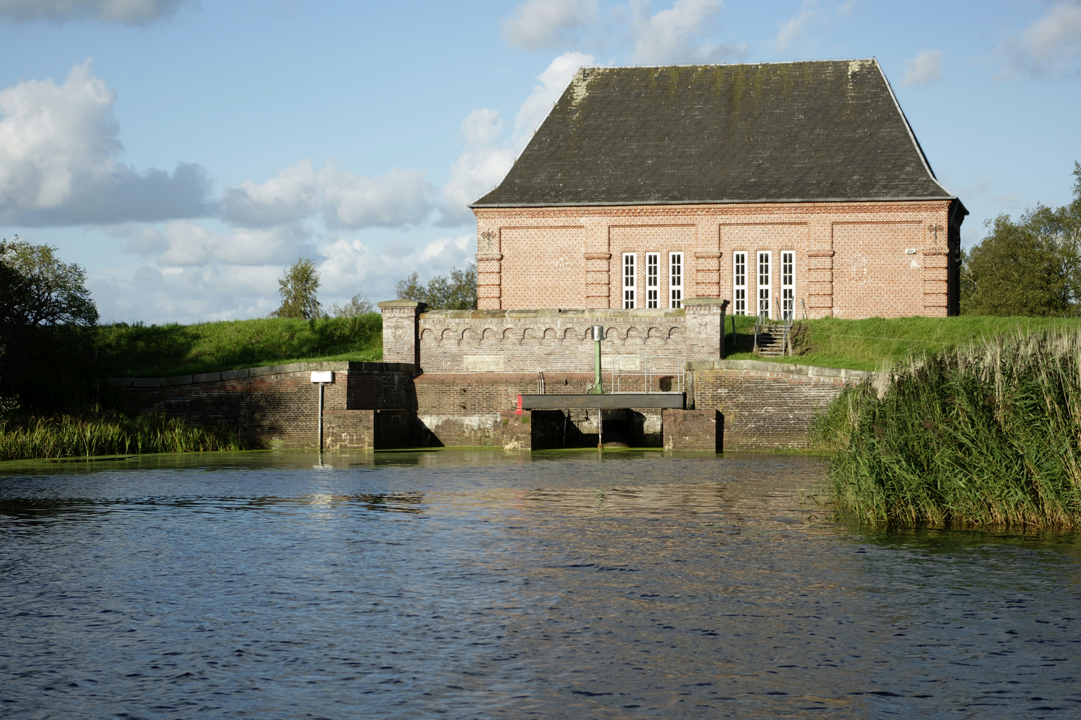 Steinschleuse Pumpwerk an der Eider Neue Schlote Wasserseite